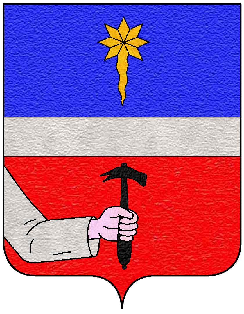 Stemma Fineschi: troncato dalla fascia diminuita d'argento, nel 1° d' azzurro alla cometa d'oro ondeggiante in palo e nel 2° di rosso al sinistrocherio di carnagione, vestito d'argento, impugnante in palo un martello al naturale